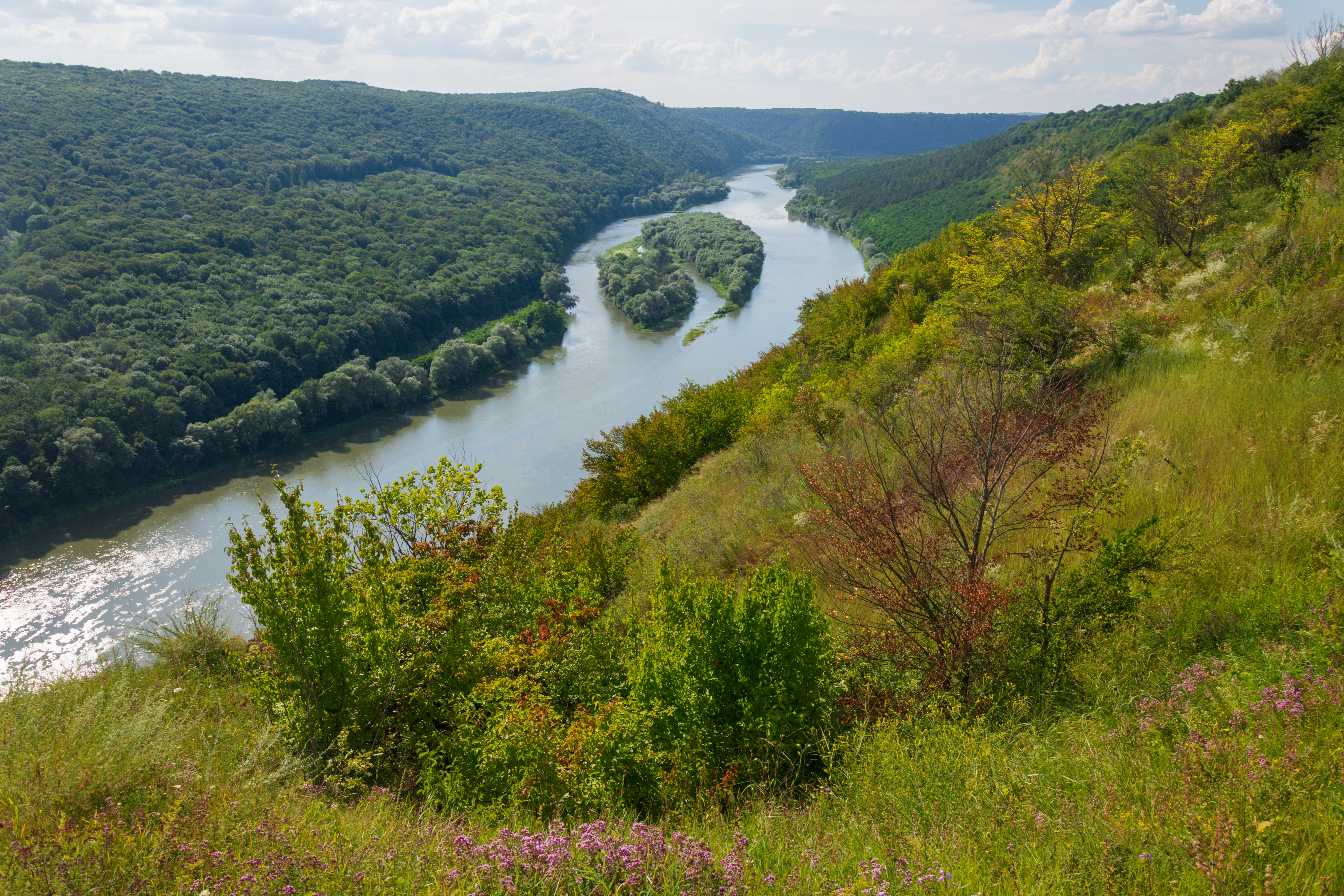 «Дністровський каньйон» поблизу с. Литяч Заліщицького району Тернопільської области.